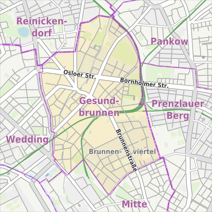 Übersichtskarte der Straßen und Ortslagen in Berlin-Gesundbrunnen